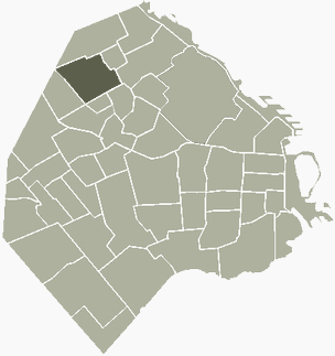 Barrio de Villa Urquiza